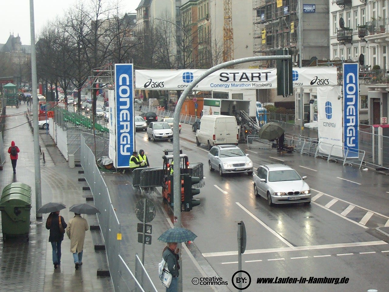 Conergy Marathon Hamburg 2006: 22.4.2006, einen Tag vor dem Start, Startreihe 1 (Karolinenstraße)